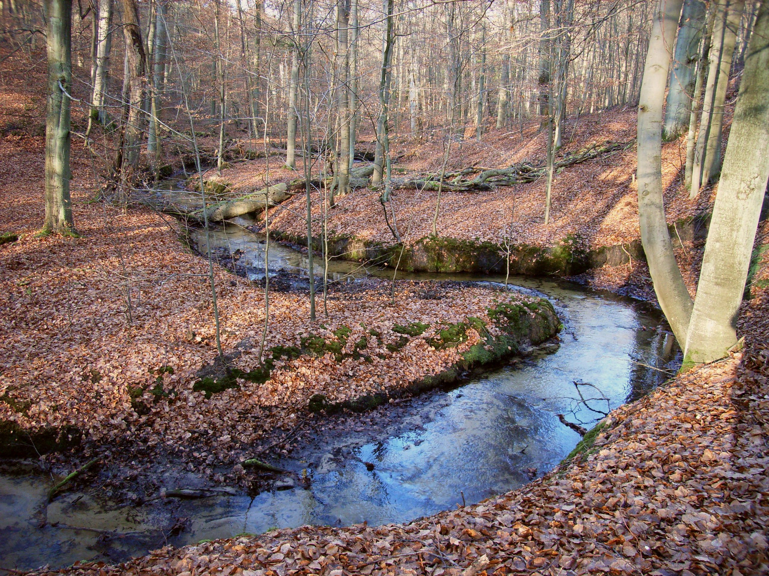 Nonnenfließ zwischen Steinerner Brücke und Liesenkreuz